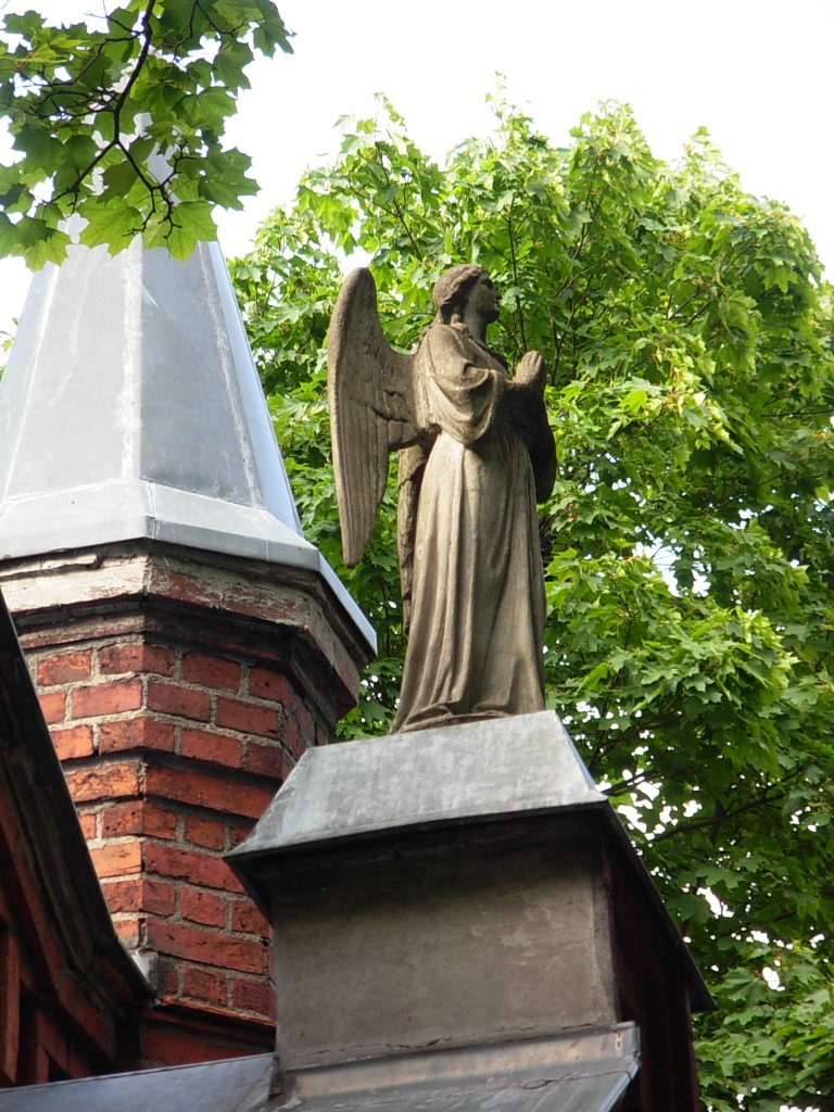 Cmentarz Starofarny Bydgoszcz